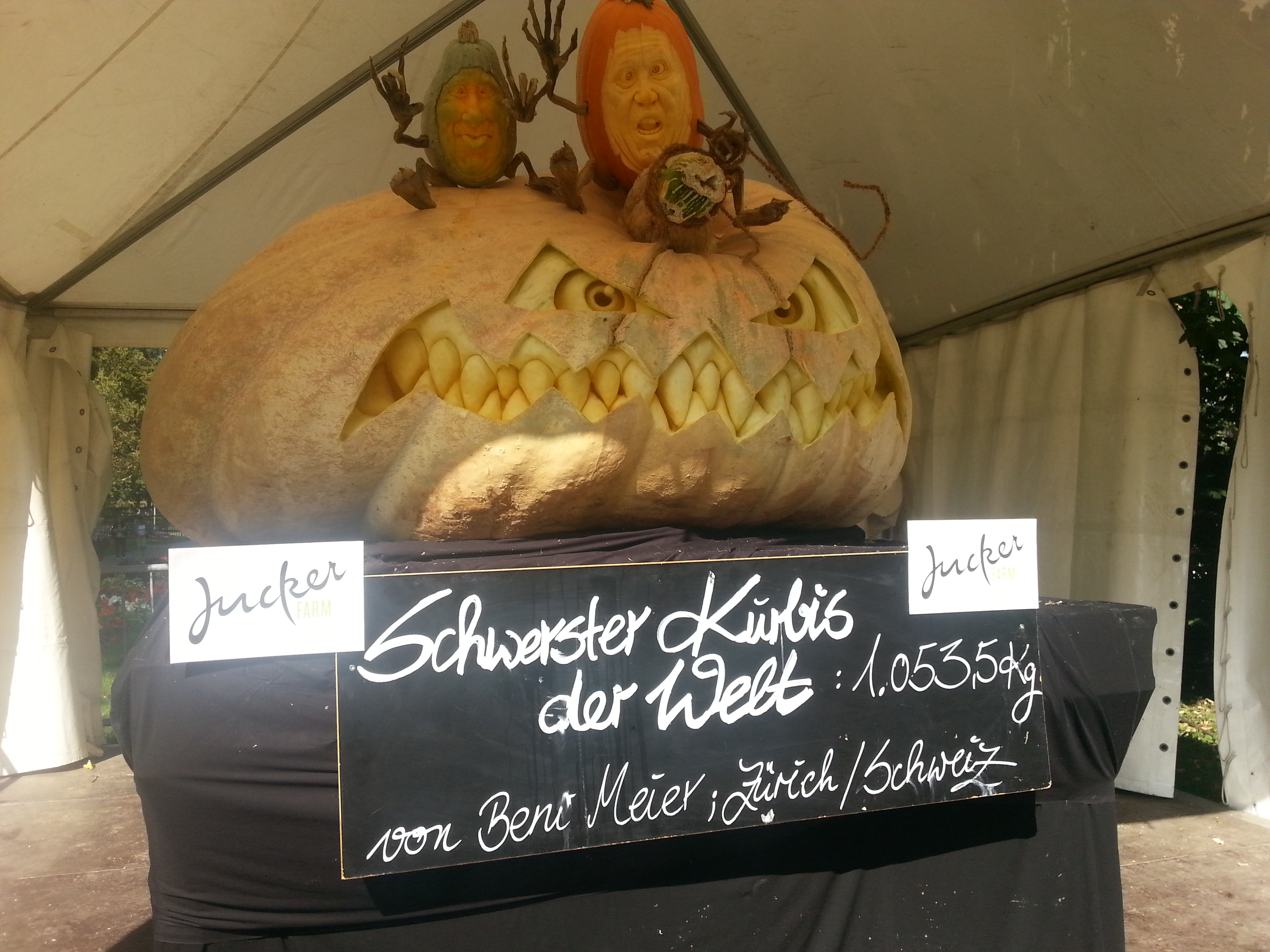 Изложение на тикви през 2013 година в Лудвигсбург, Германия